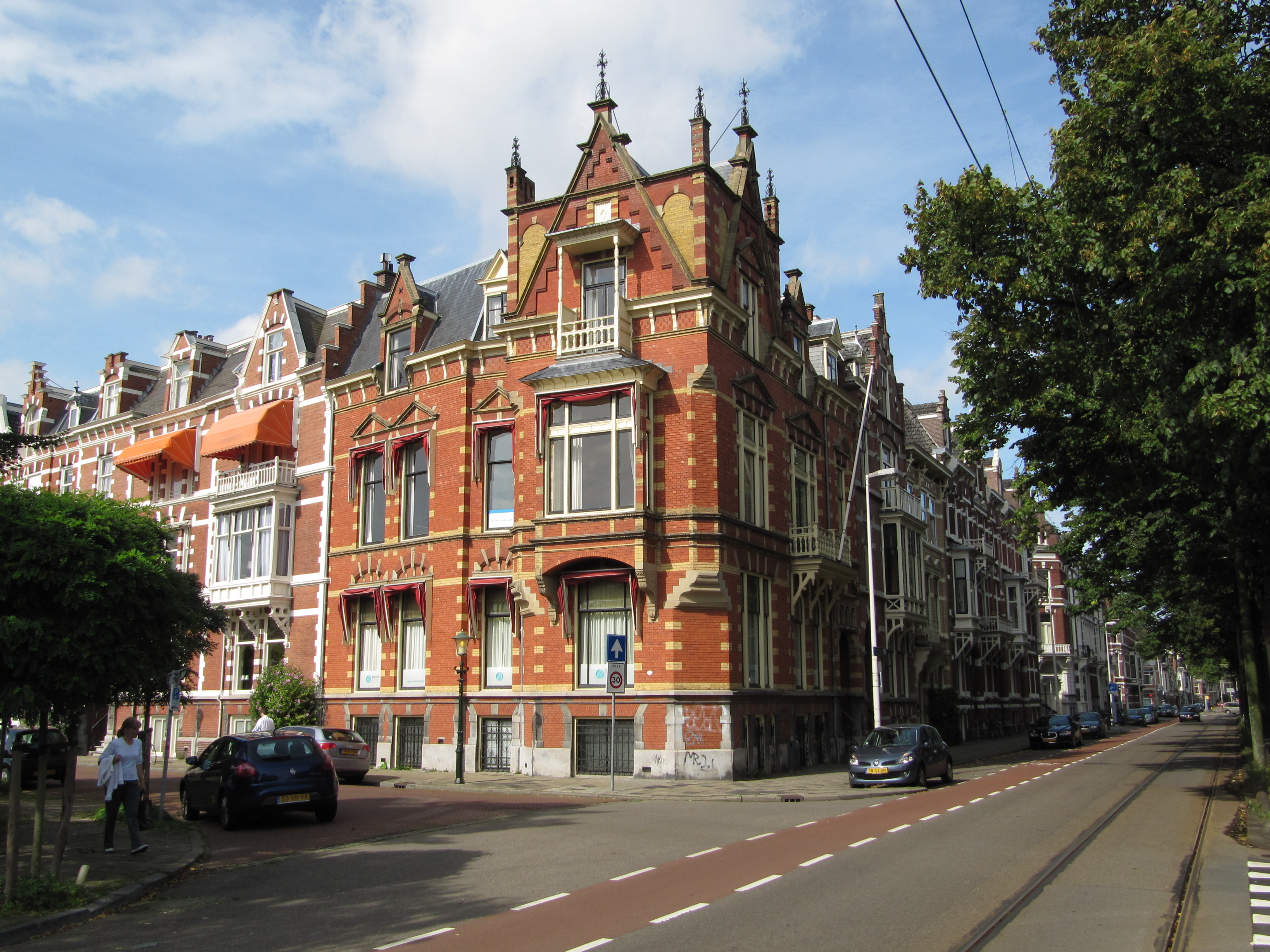 RM17629 Den Haag - Kon Emmakade 172.jpg